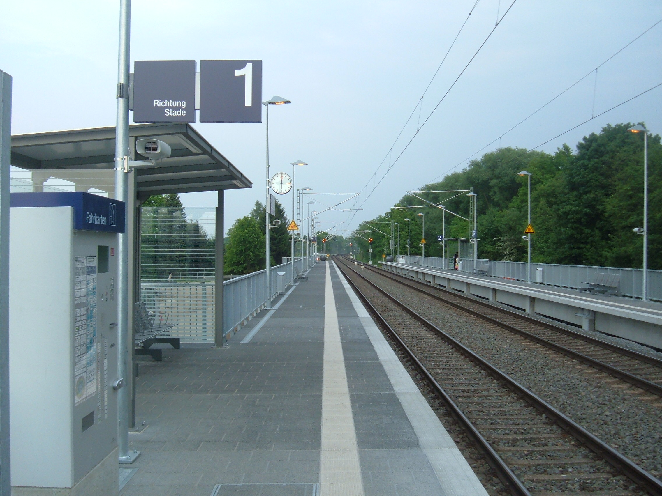 Haltepunkt Fischbek der Hamburger S-Bahn.